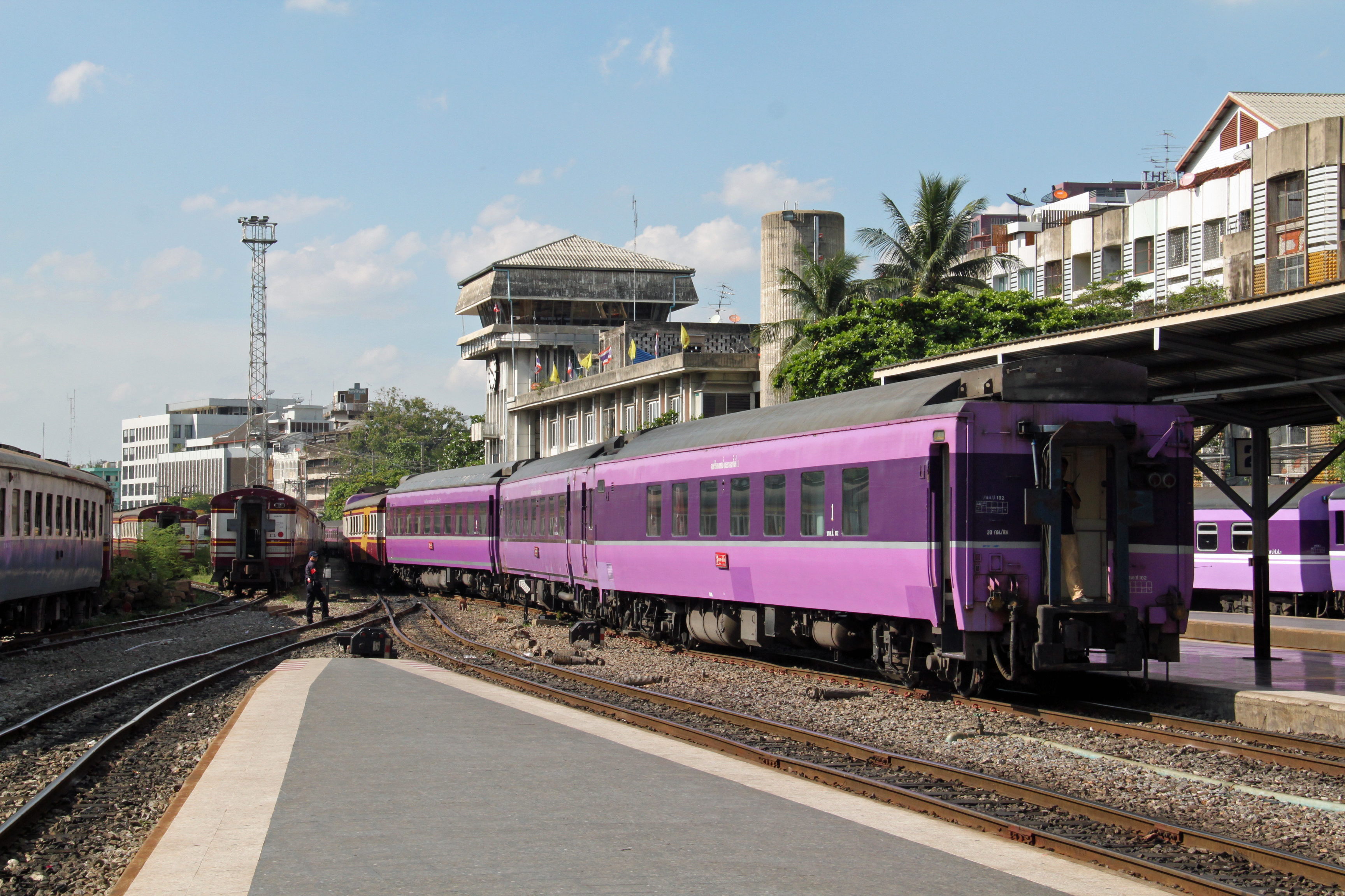 Carriage of Thailand State Railways